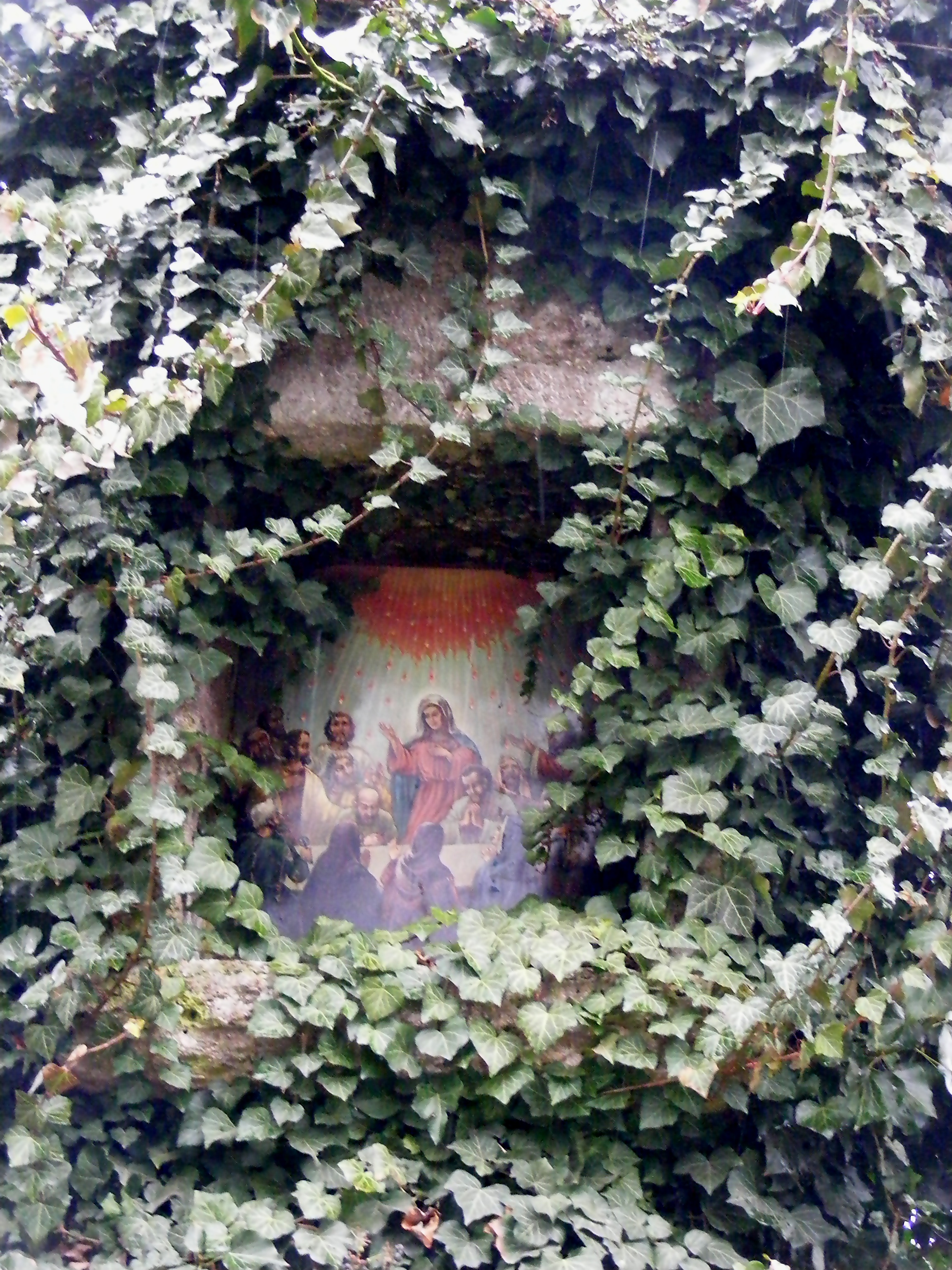 Bildstock Nr. XIII der Geheimnissäulen auf dem Weg nach Maria Plain, auf dem Plainberg, Bergheim, Land Salzburg